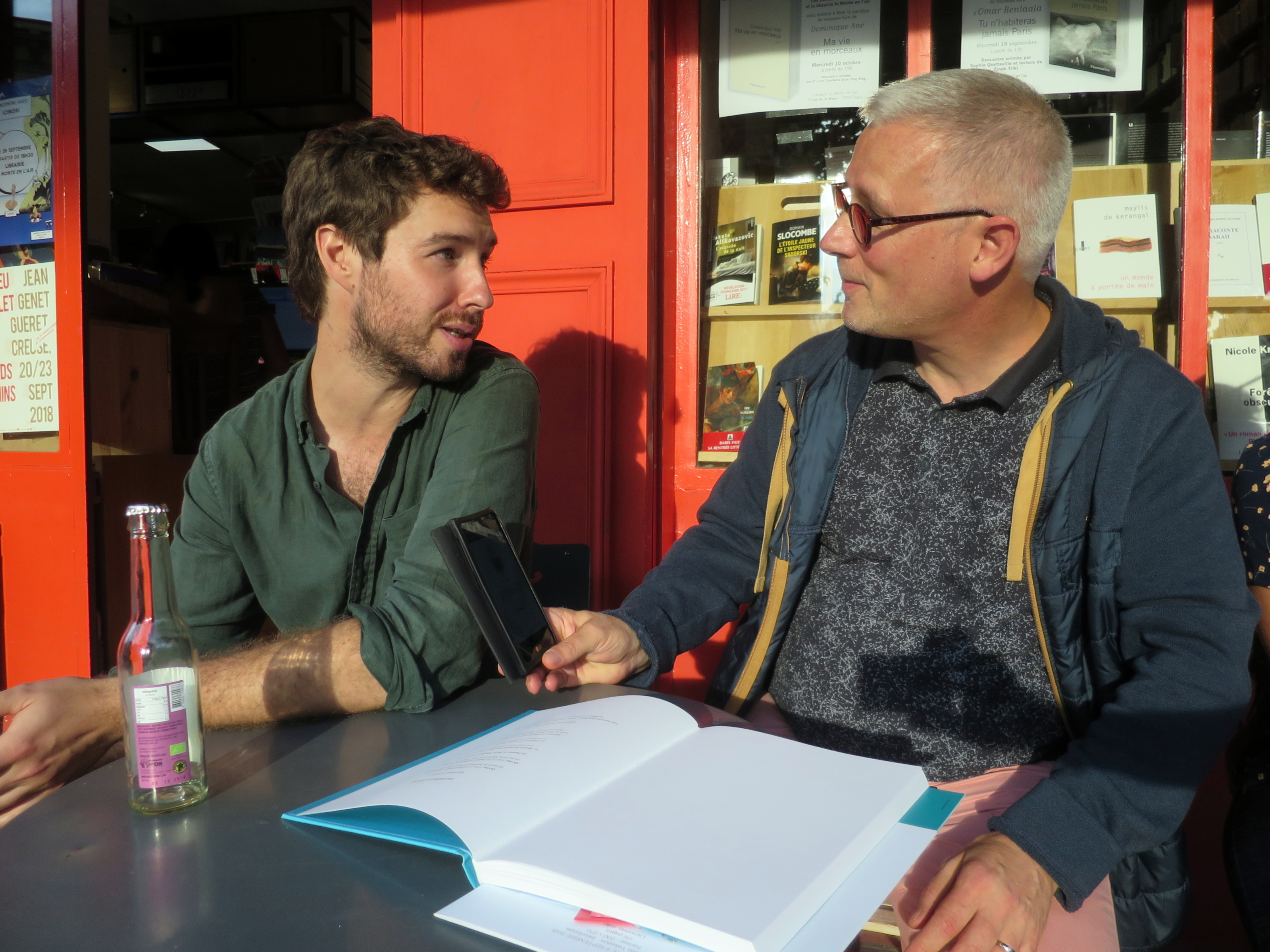 Mathieu Burniat interviewé par Didier Pasamonik à la librairie Le-Monte-en-l'air, à Paris, lors du lancement de la bande dessinée "Une mémoire de roi" par les éditions Premier Parallèle.